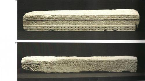 Torcotorio e Salusio